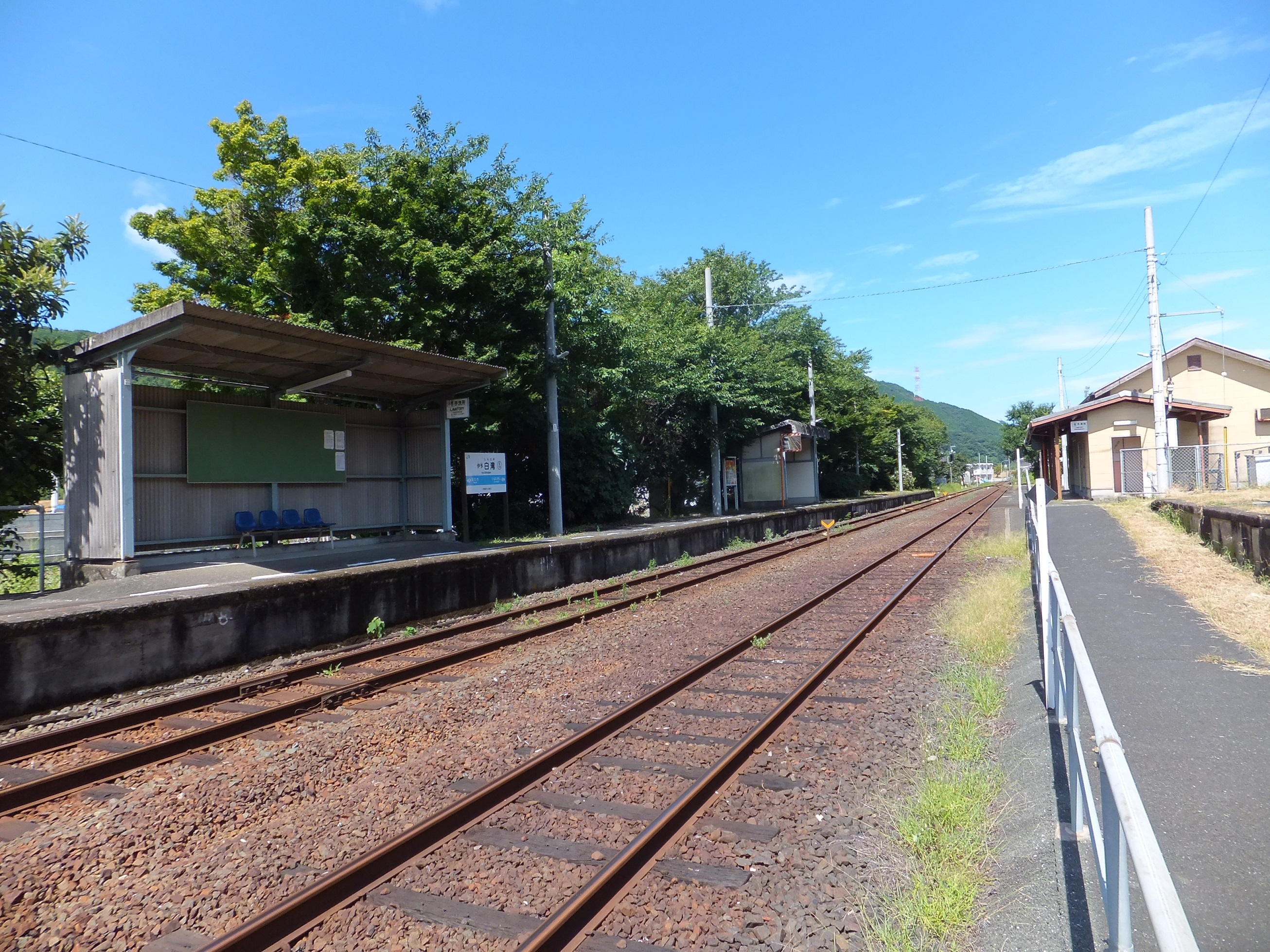 愛媛県大洲市 JR四国予讃線 伊予白滝駅